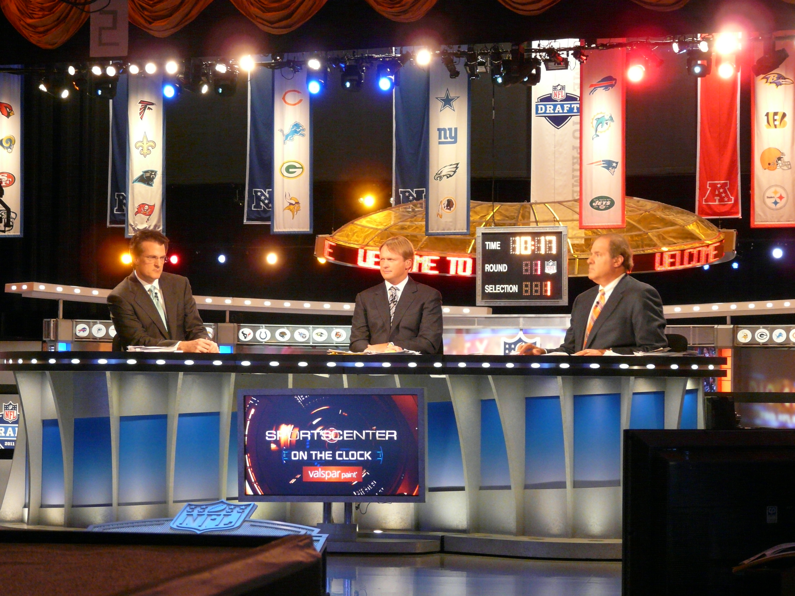 Mel Kiper Jr., Jon Gruden and Chris Berman